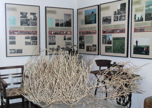 Disteln im Baragan